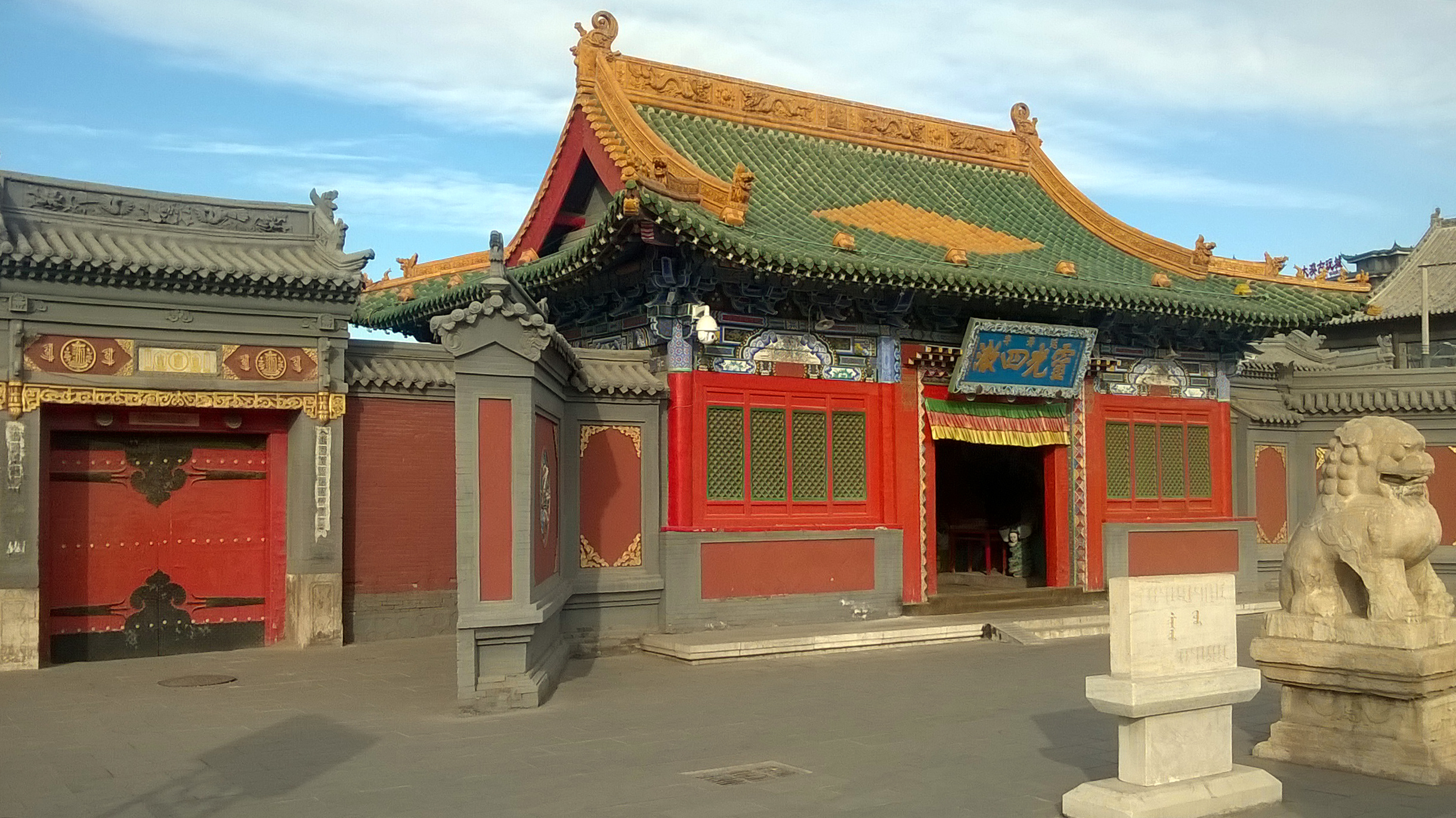 席力图召。